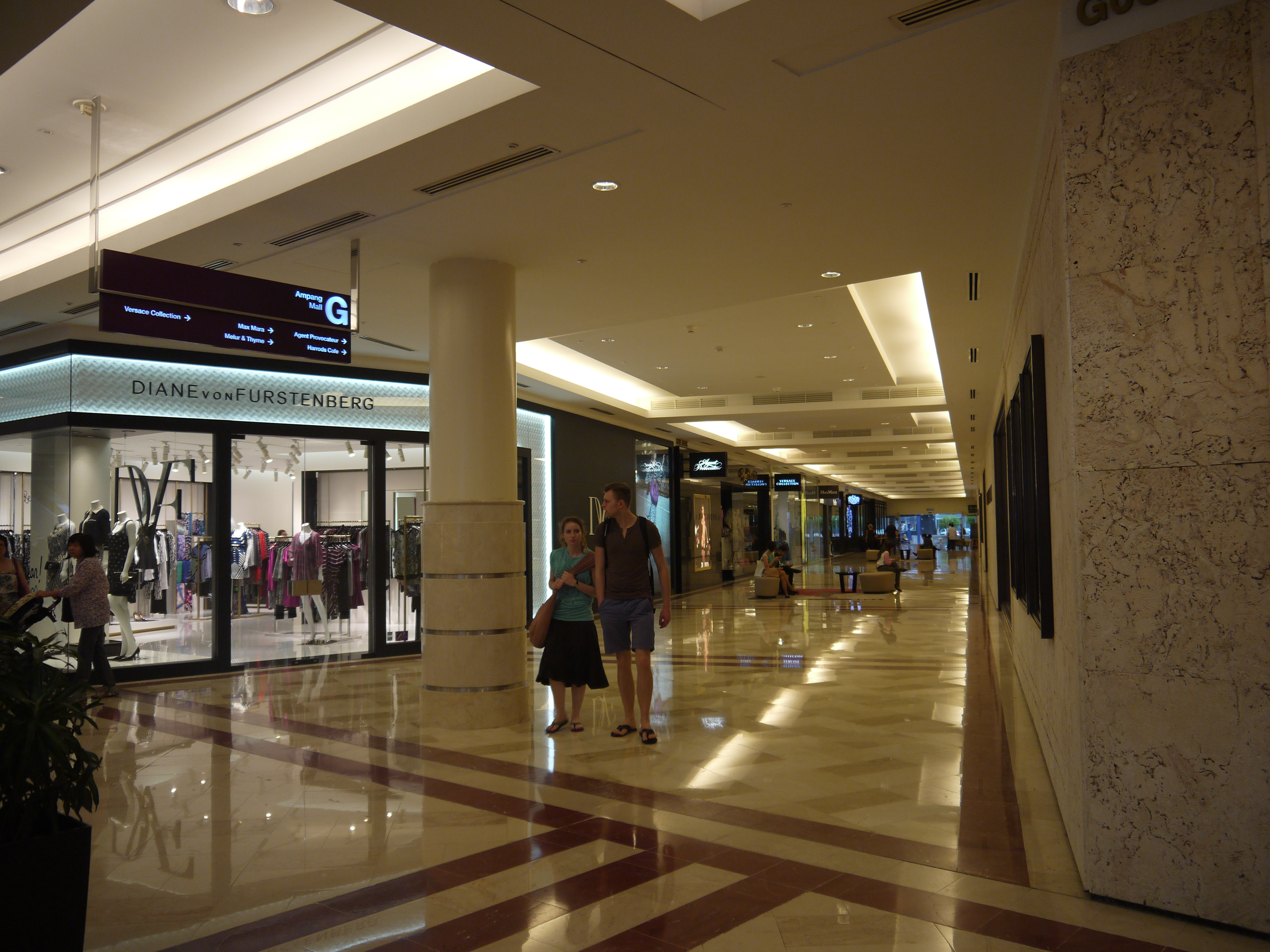 Suria KLCC interior